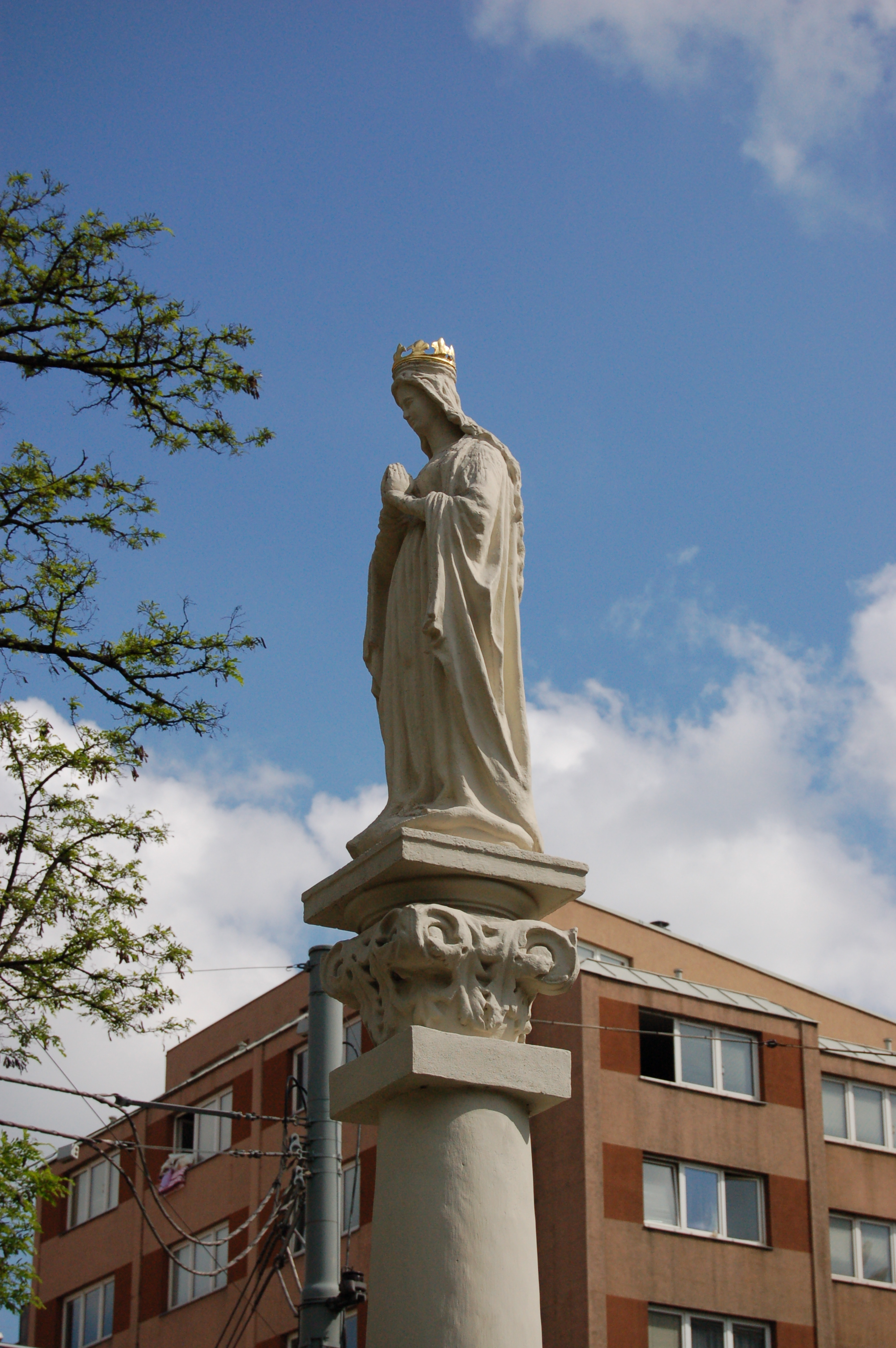 Die Mariensäule befindet sich gegenüber dem Gegenüber Johann-Nepomuk-Berger-Platz 1 in Wien-Ottakring.